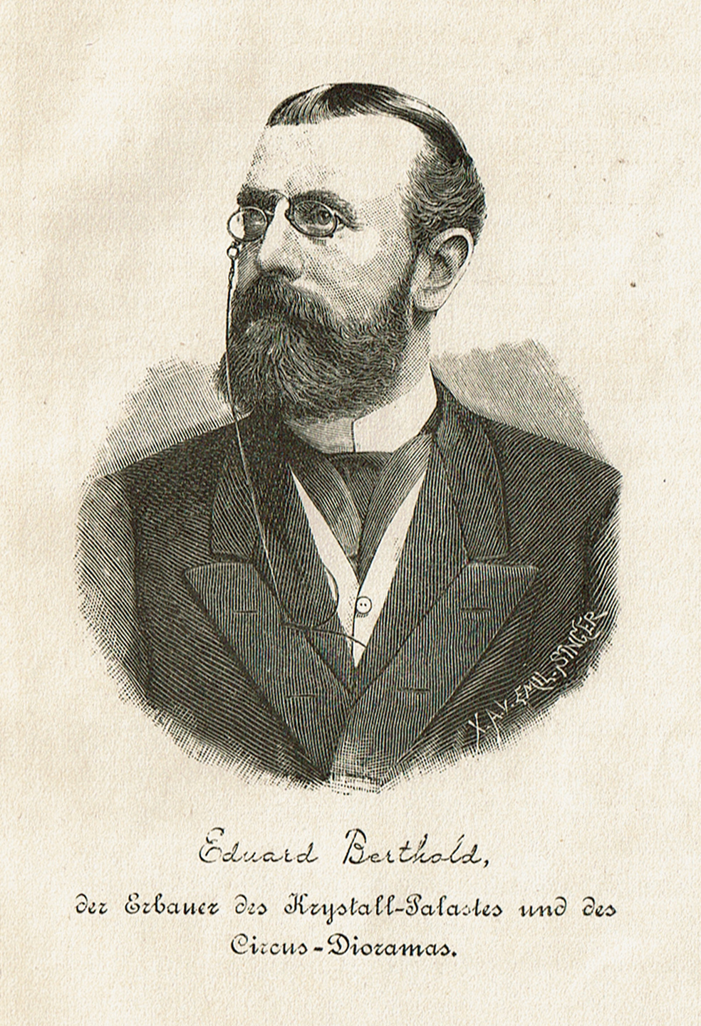 Eduard Berthold, Gründer des Leipziger Krystall-Palastes